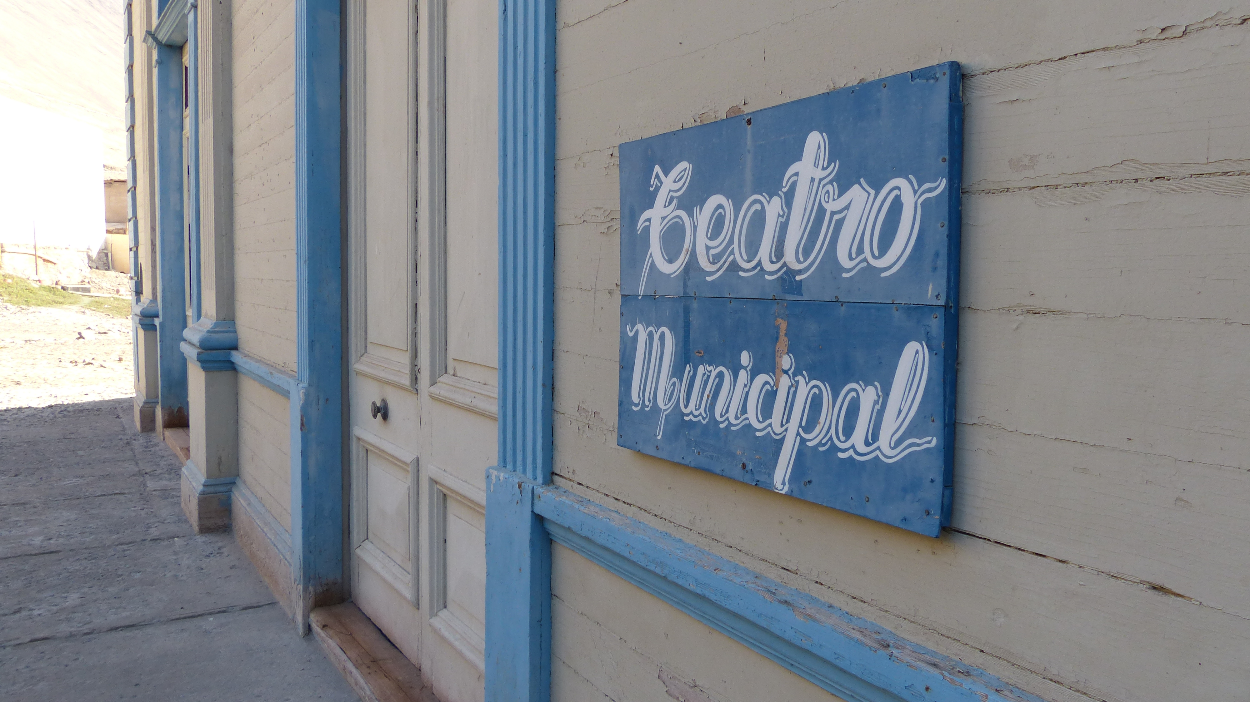 Teatro Municipal de Pisagua This is a photo of a national monument in Chile: 282